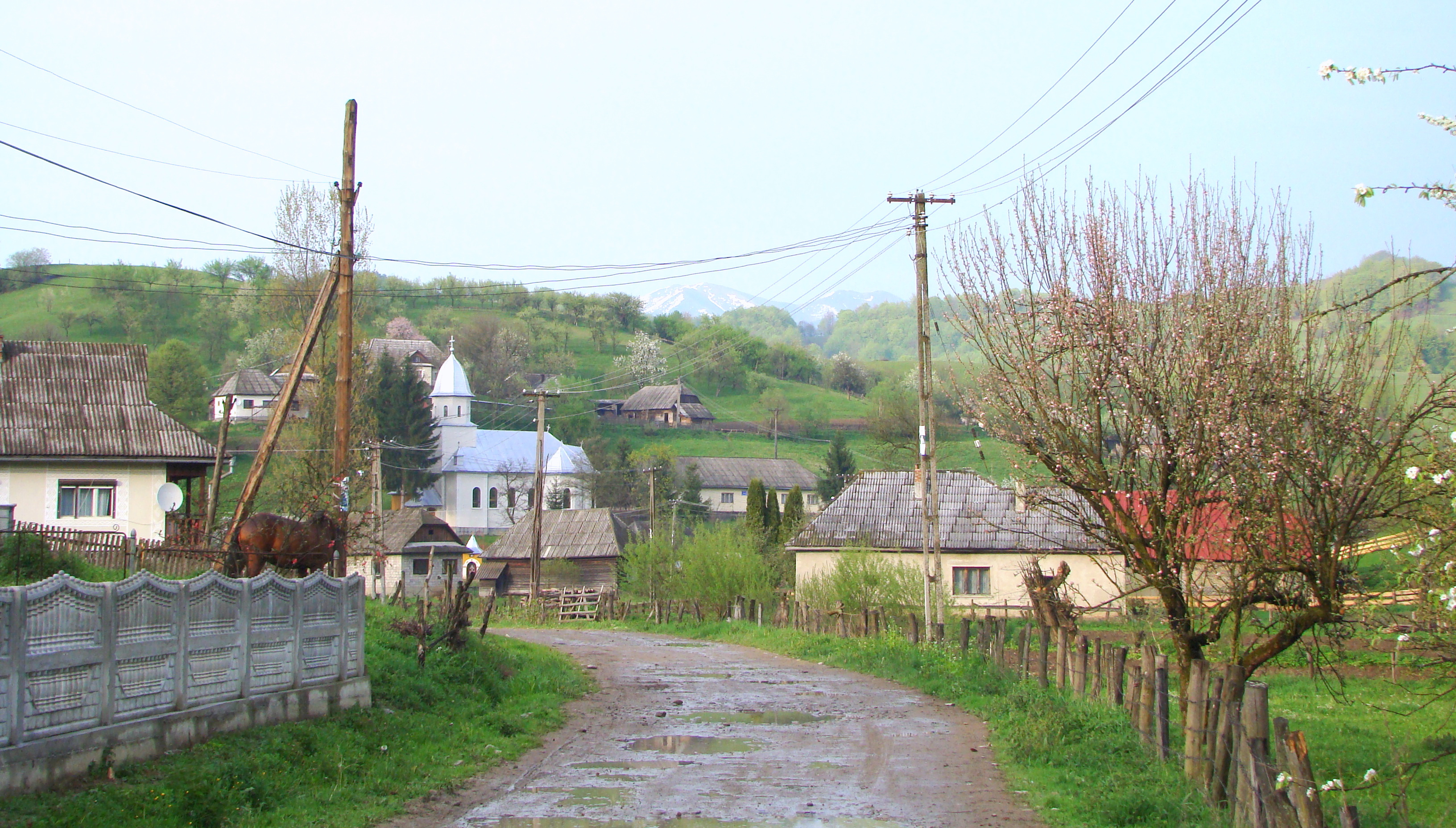 Larga, județul Maramureș